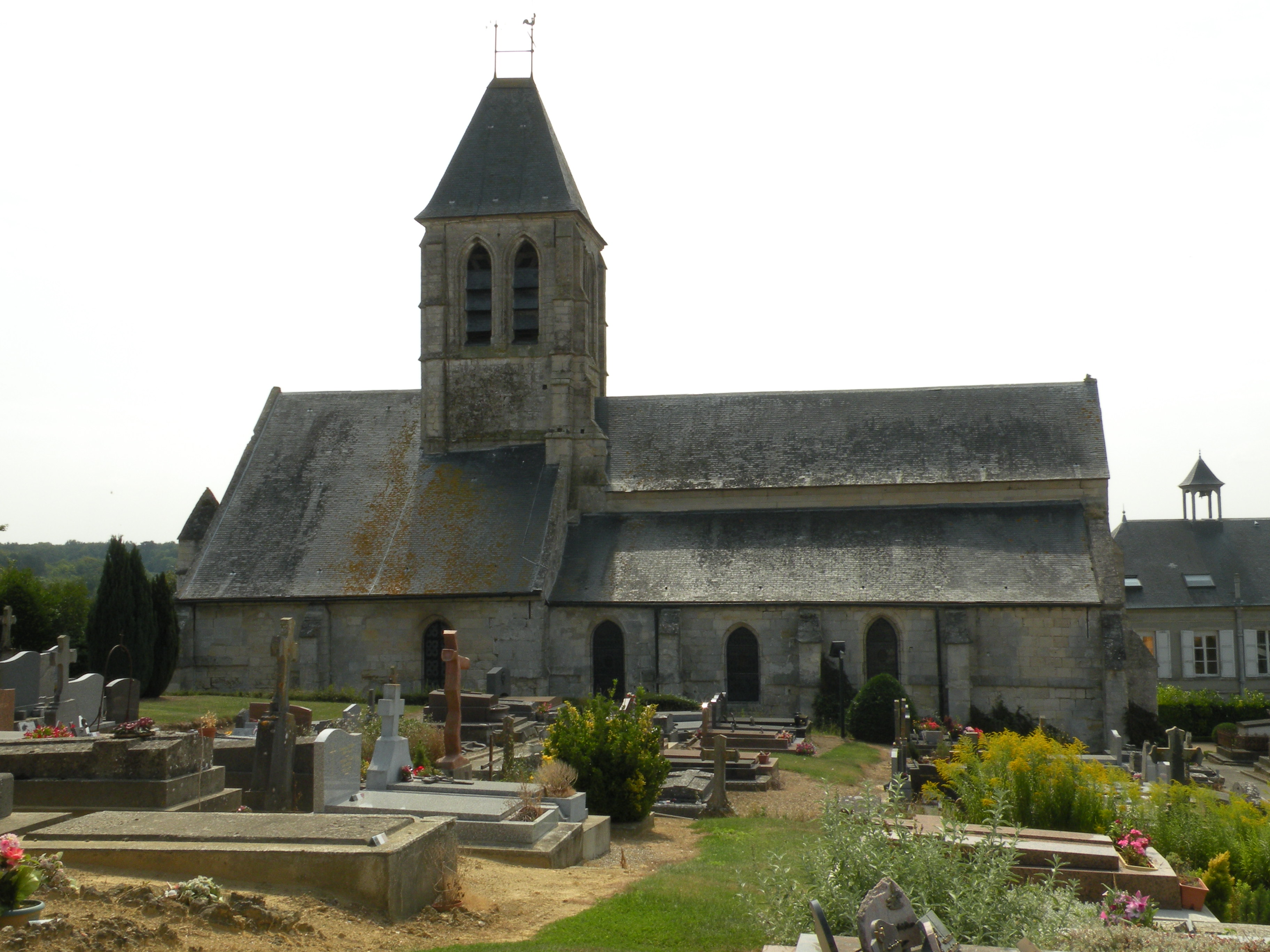 Église d'Arronville vue du cimetière, Val-d'Oise, France